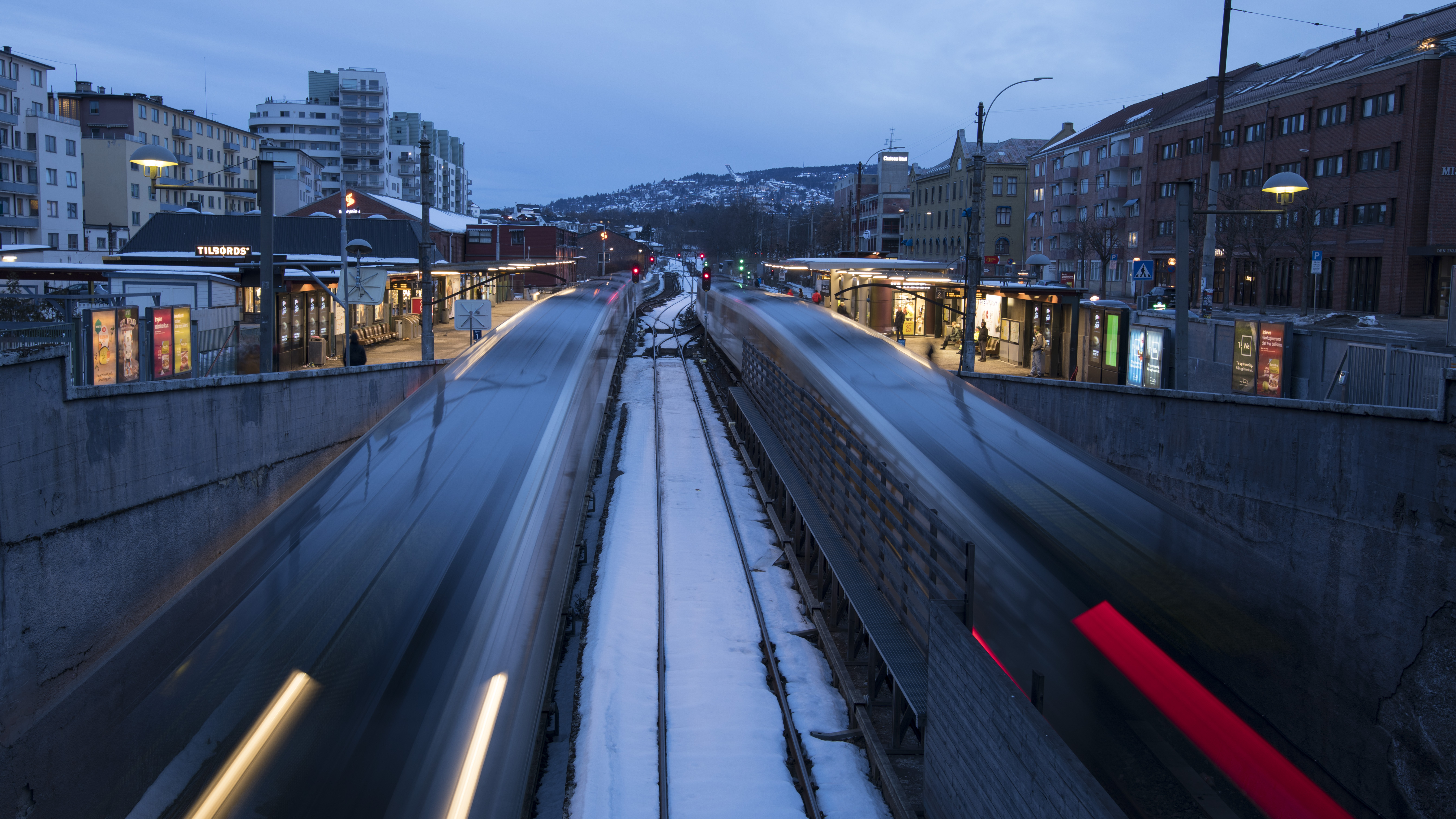 Østgående og vestgående MX3000-sett på vei inn og ut av Fellestunnelen ved Majorstuen stasjon.